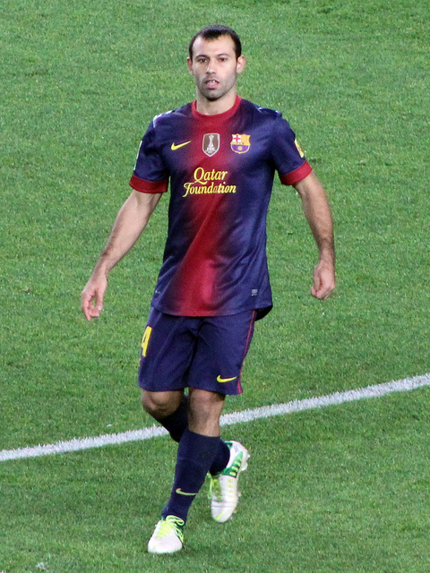 Javier Mascherano jugando un partido con el FC Barcelona.